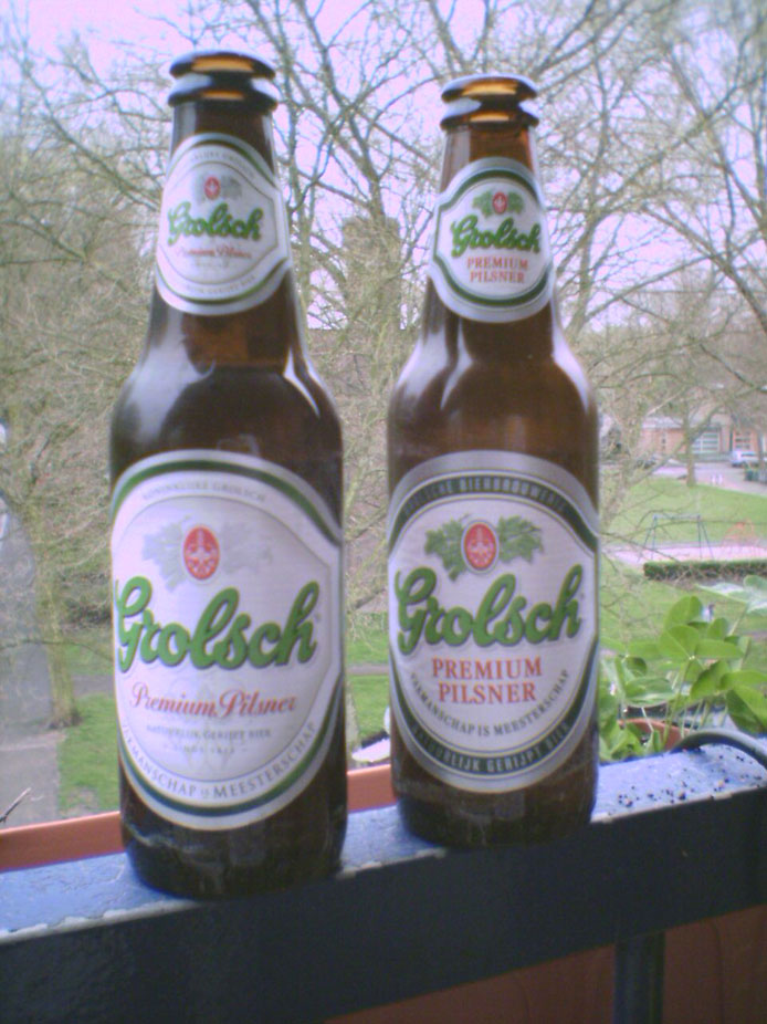 Zojuist ontdekt dat Grolsch een nieuw etiket heeft. Meteen buiten maar even een foto van gemaakt om op wikipedia te zetten! Het is een foto uit een telefoon, dus de kwaliteit laat te wensen over, helaas. Wat rechten betreft: Ik neem aan dat meneer Grolsch er geen problemen mee heeft dat ik foto's van zijn bierflesjes maak.